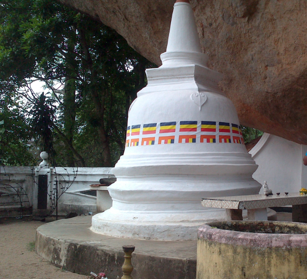 සිංහල: වාරණ රජමහා විහාරයේ මැදි මළුවේ දාගැබ